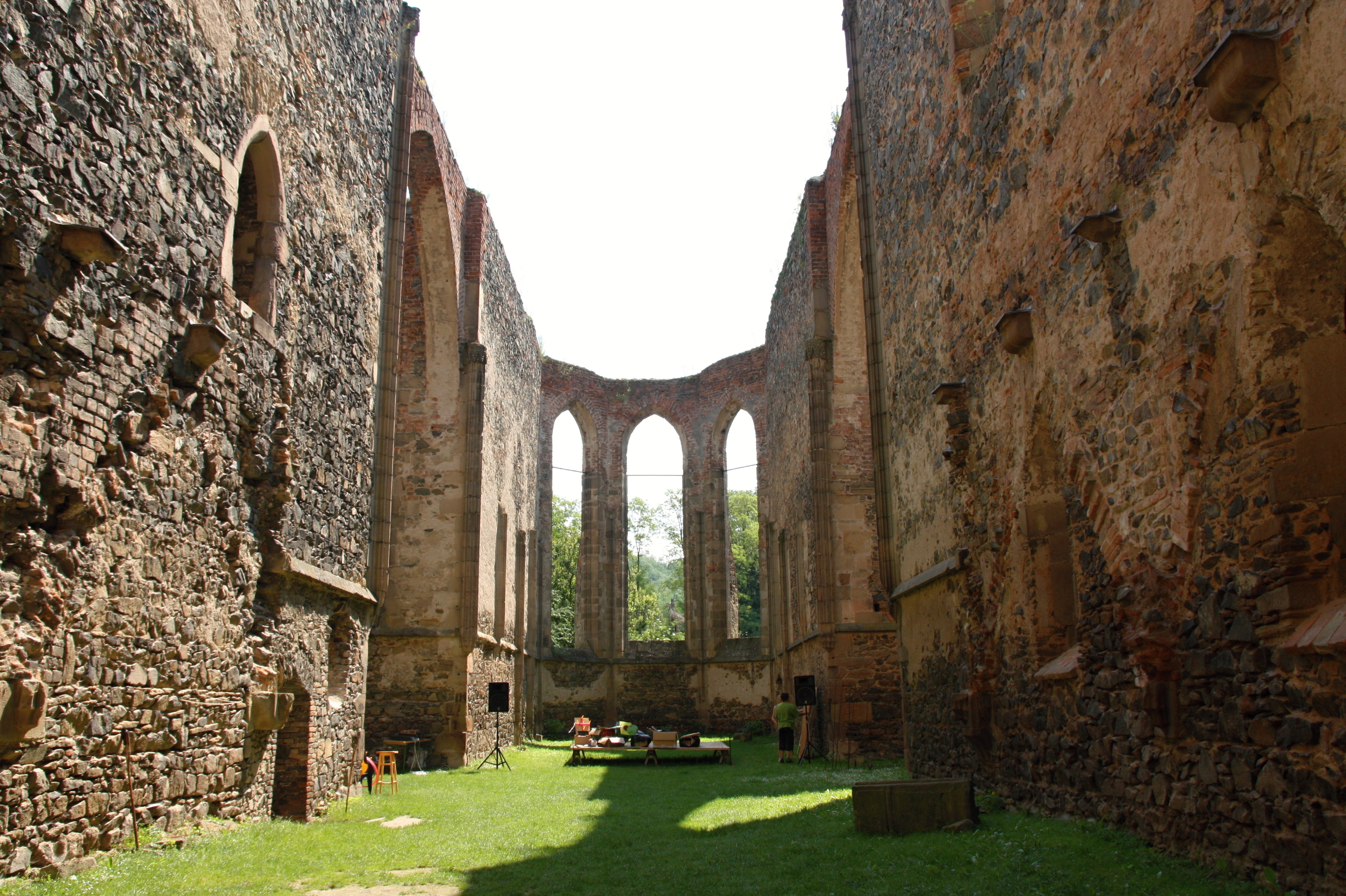 Klášter Rosa Coeli, zřícenina (Dolní Kounice), Dolní Kounice